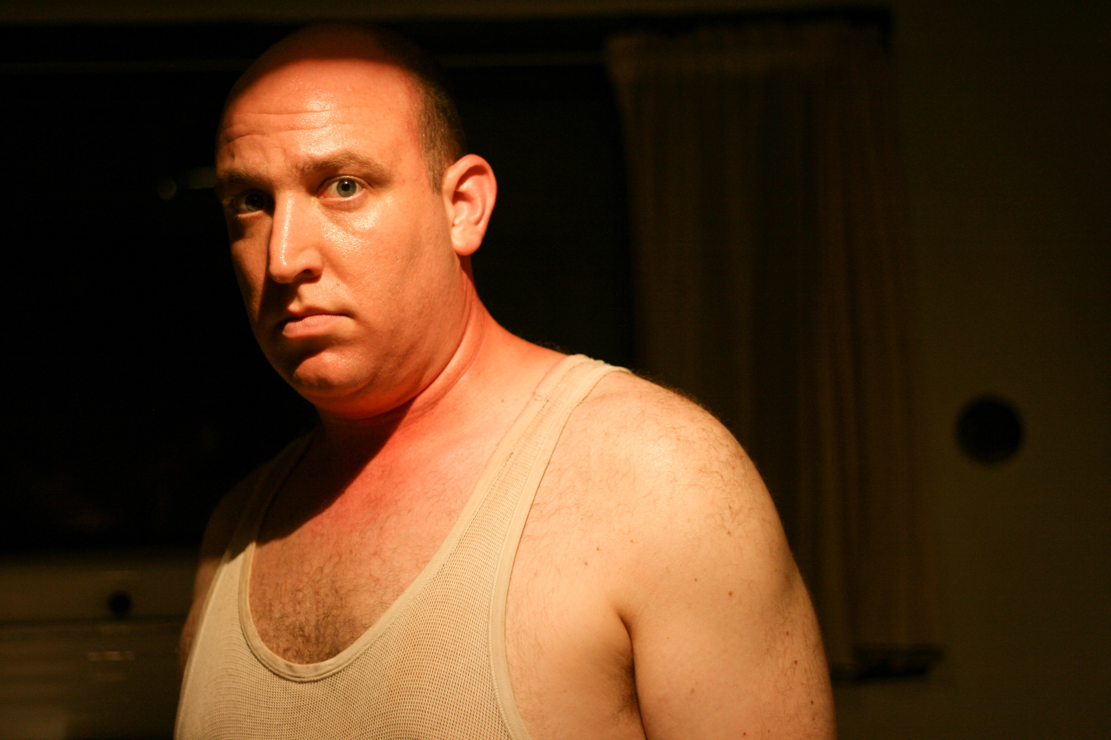 יובל ינאי בסרט לוויה בצהריים צילום ערן כהן 2012 (2)